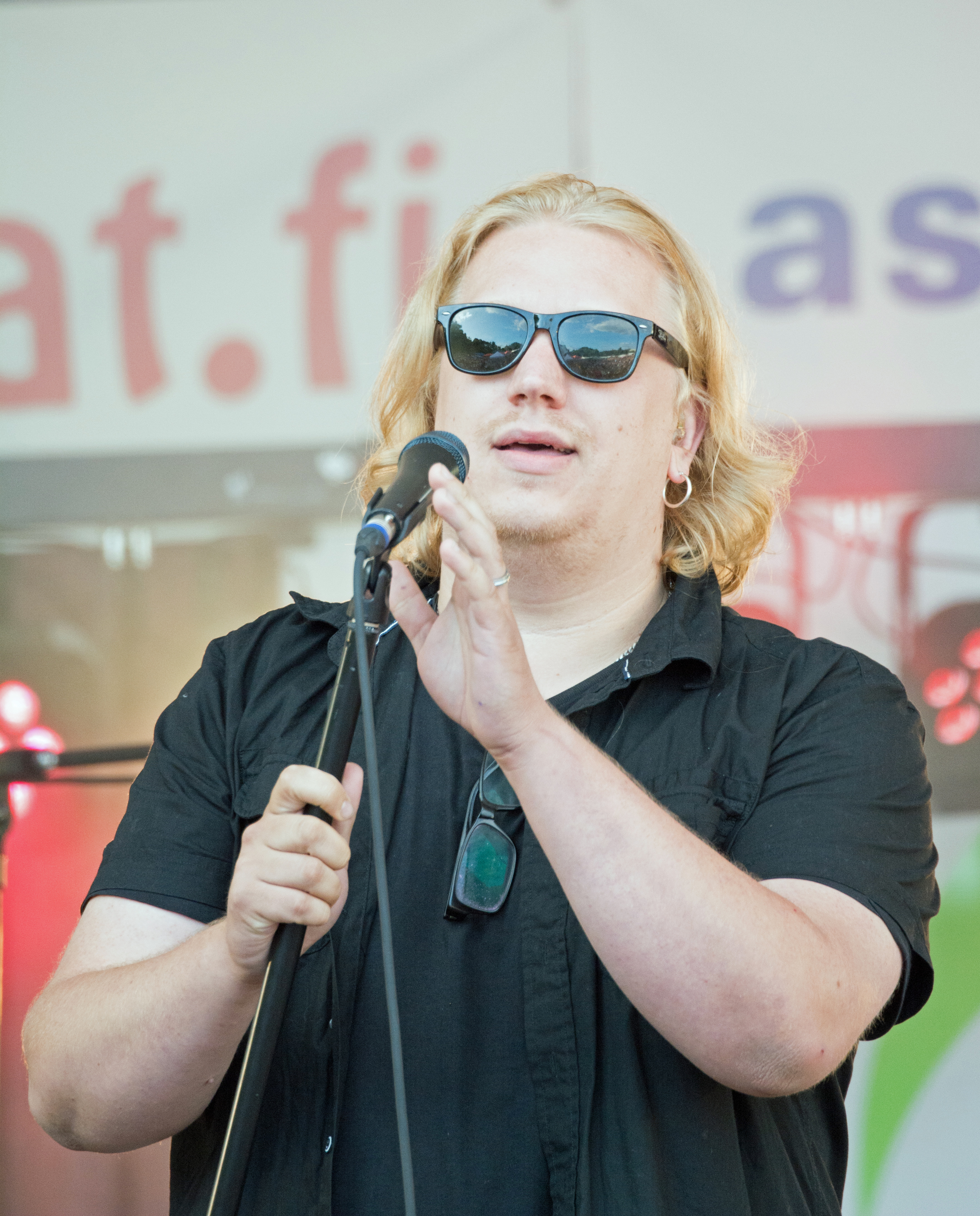 Arttu wiskari suomalainen laulaja